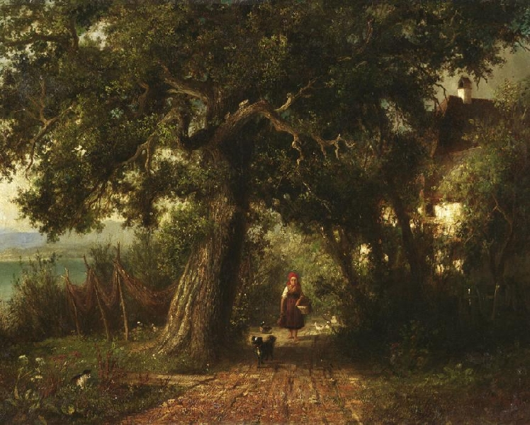 Idyllischer Sommertag. Bauermädchen, umringt von Hund und Katz und Federvieh, am Ufer eines Bergsees